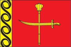 Illineckyi rh